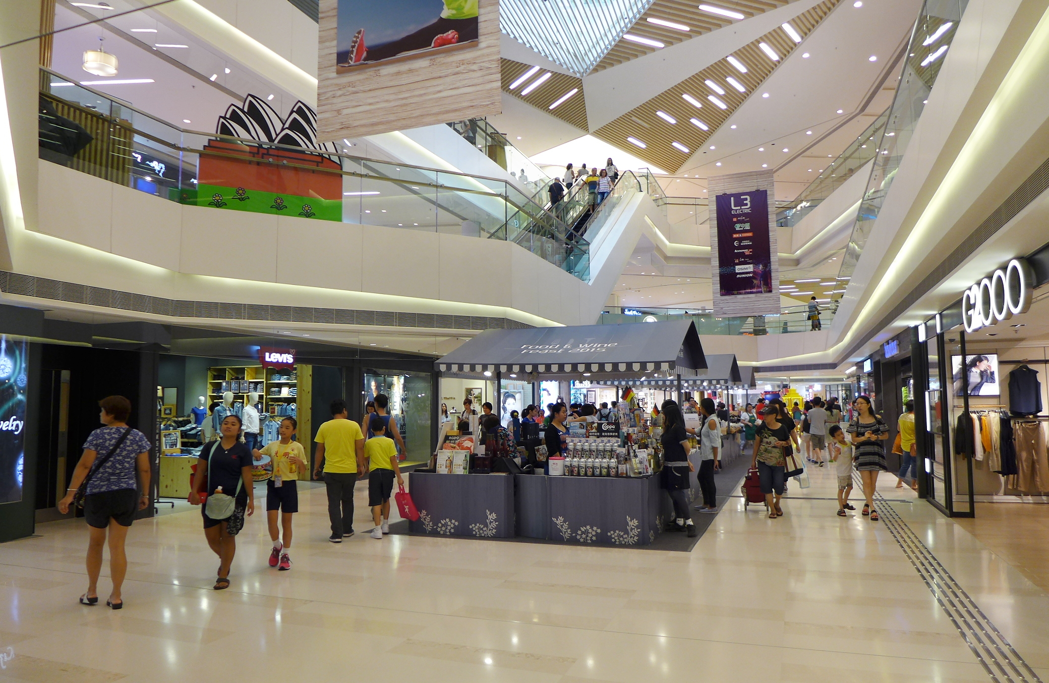 Sun Yuen Long Centre Atrium_